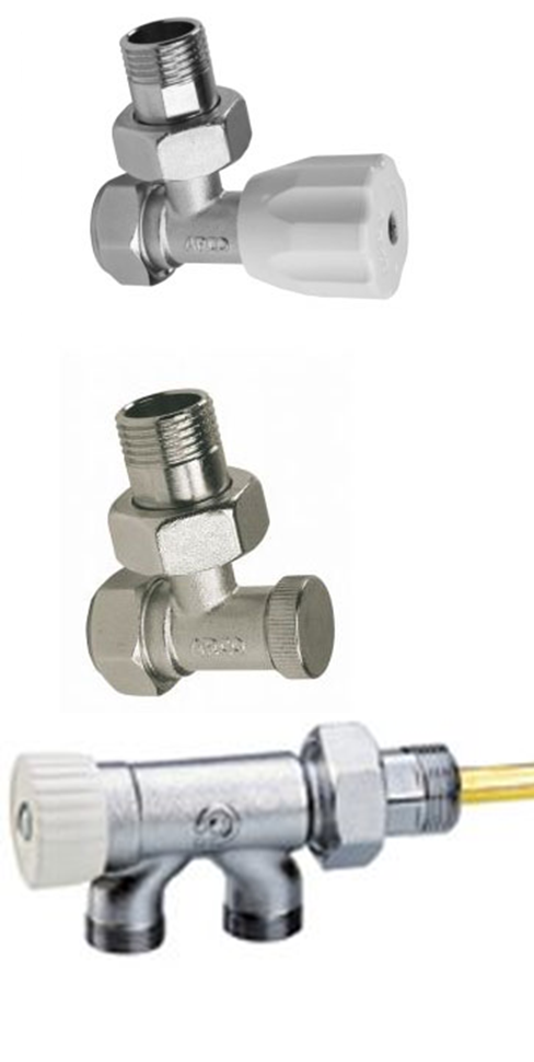 válvula de reglaje, detentor y válvula de 4 vías para monotubo